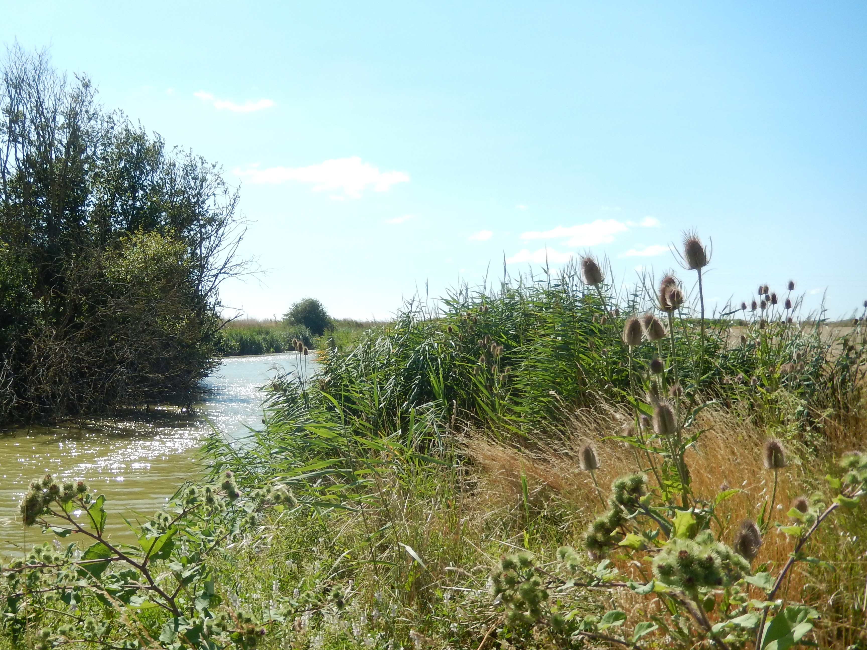 Beaugeay, Charente-Maritime, France. • L'Est de la commune de Beaugeay, aux environs du Havre de Brouage, fait partie d'une zone marécageuse, à l'emplacement de l'ancien Golfe de Saintonge. Cette photo, prise aux environs de l'écluse du canal de Brouage, témoigne de la végétation typique de cet environnement.